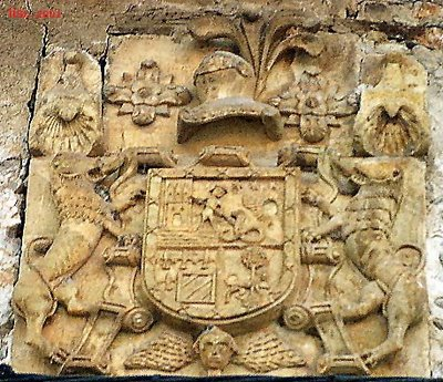 Escudo de la casa solariega de Villalibre de la Jurisdicción